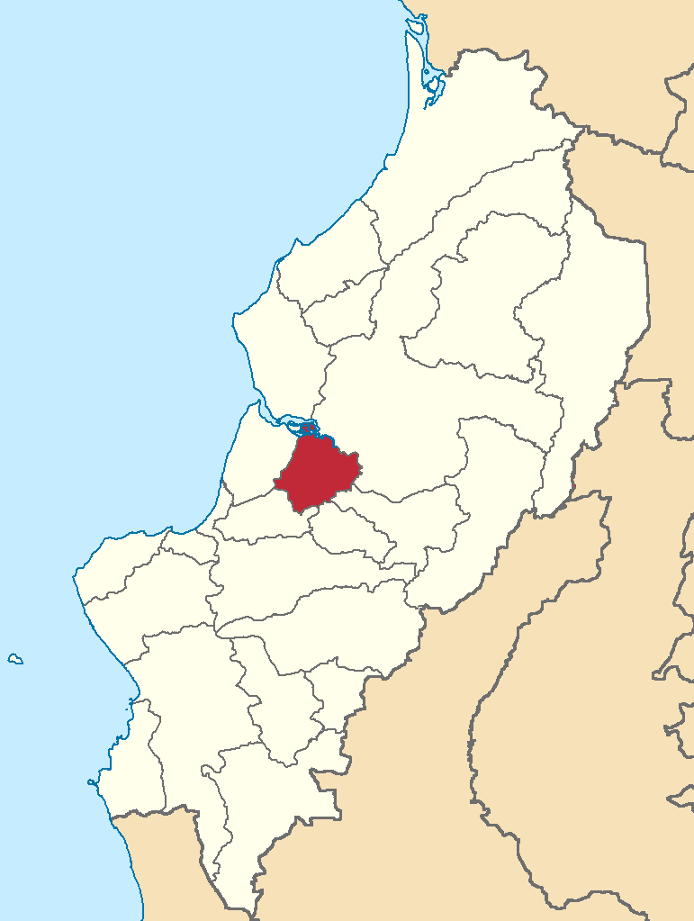 Mapa localizador del cantón en Manabí, Ecuador